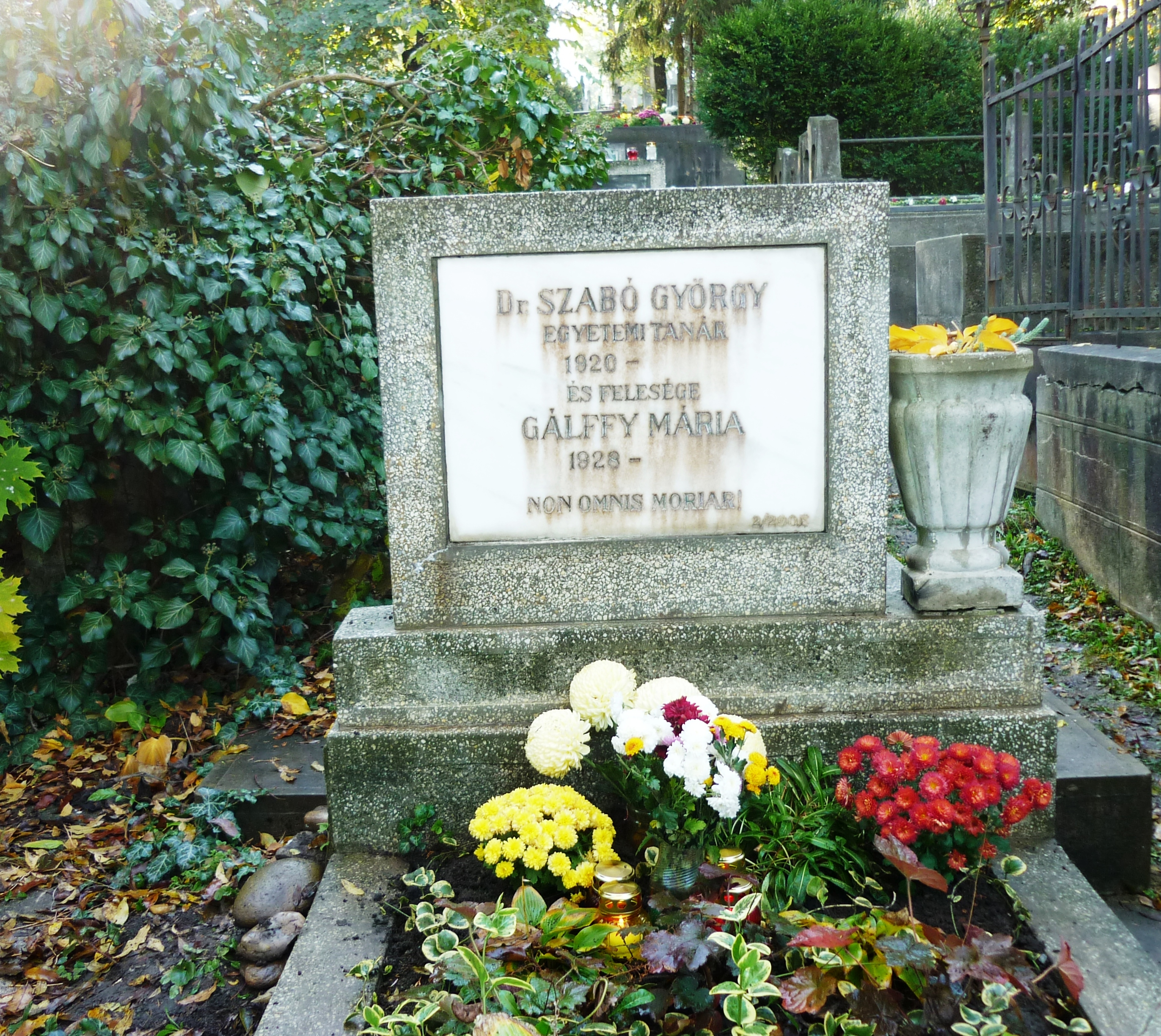 Szabó György sírja a Házsongárdi temetőben (lutheránus temetőrész)